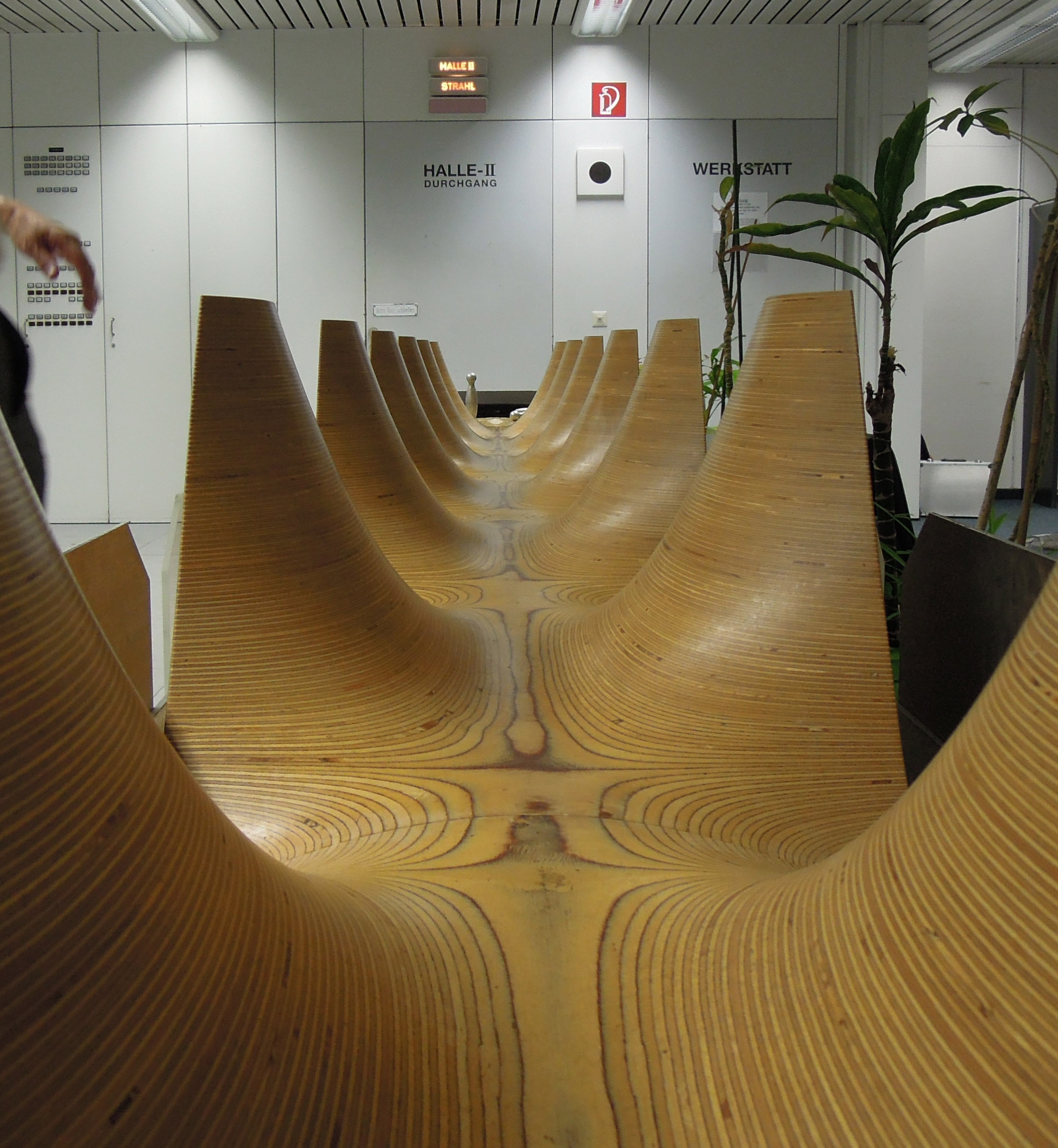 Maier-Leibnitz-Laboratorium: Demonstration des Funktionsprinzips einer magntischen Linse anhand eines Holzmodells